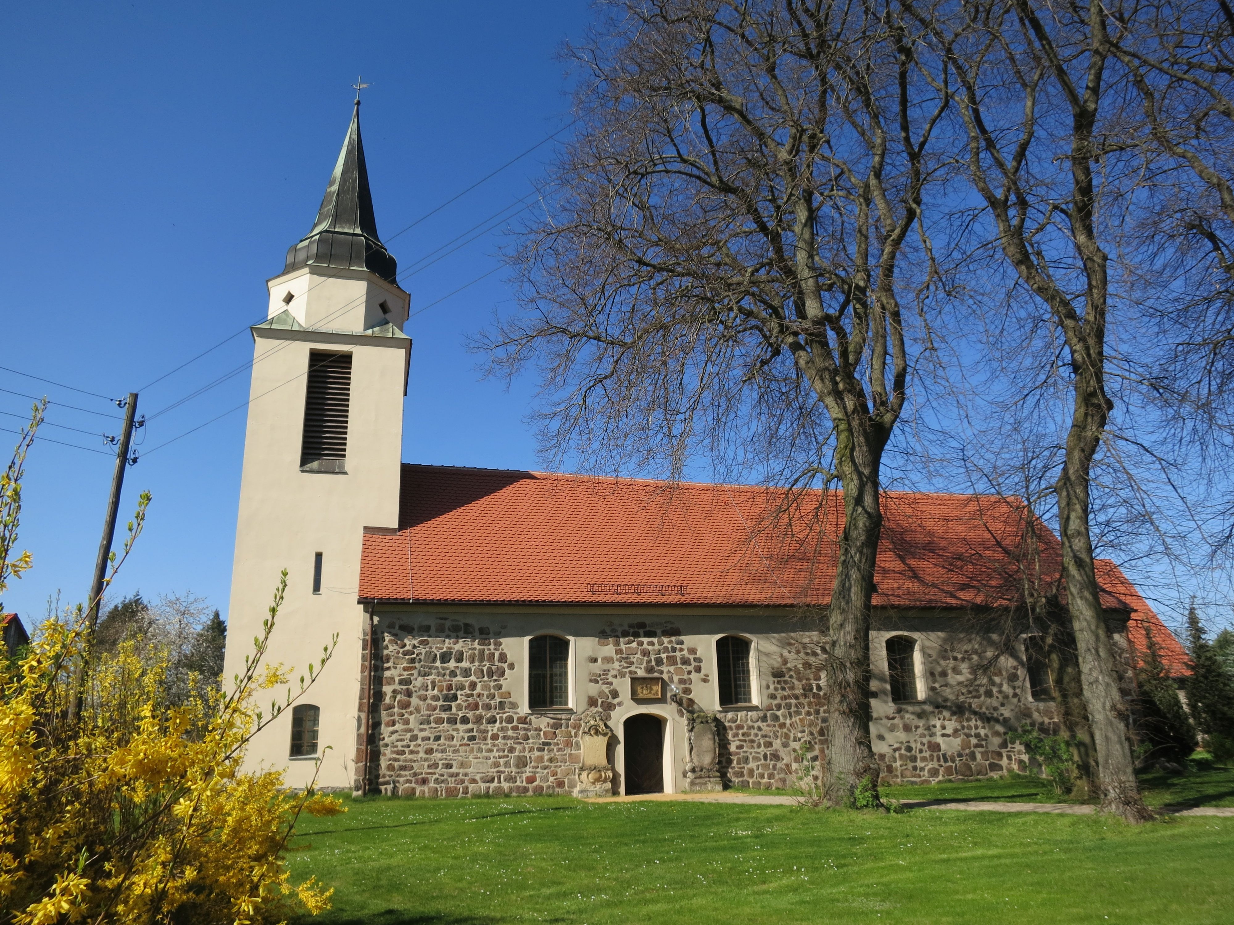 Boßdorf, Kirche von Südwesten